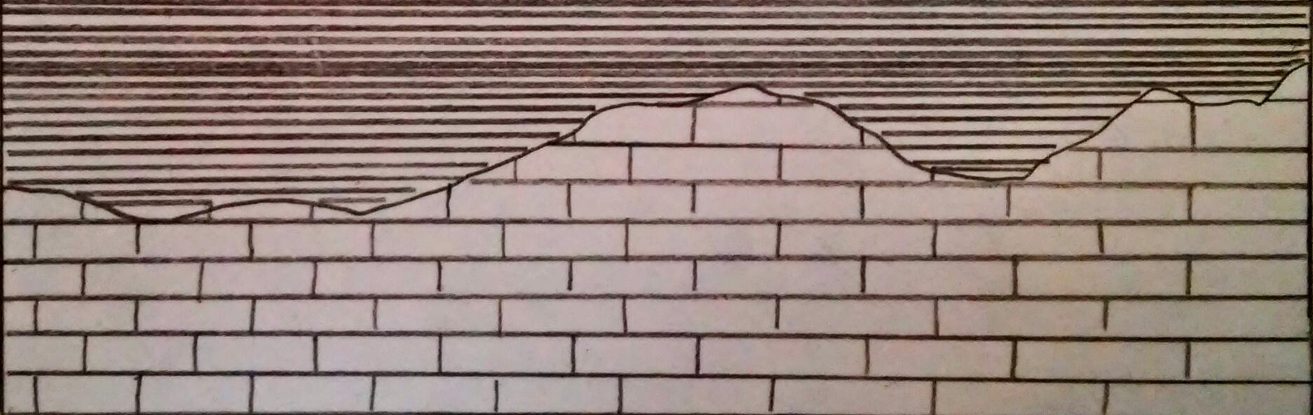 Skitsering af inkonformitet.